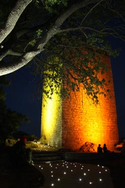 Tour du Revest-les-Eaux illuminée